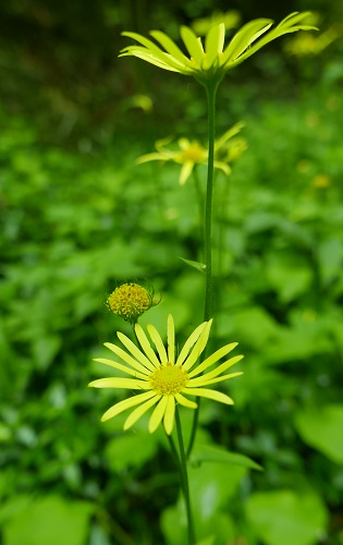 Il doronico medicinale è una specie dai pregevoli utilizzi officinali